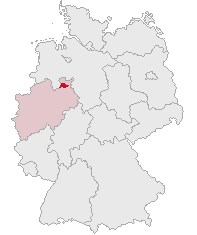 Kreis Herford, North Rhine-Westphalia, Germany